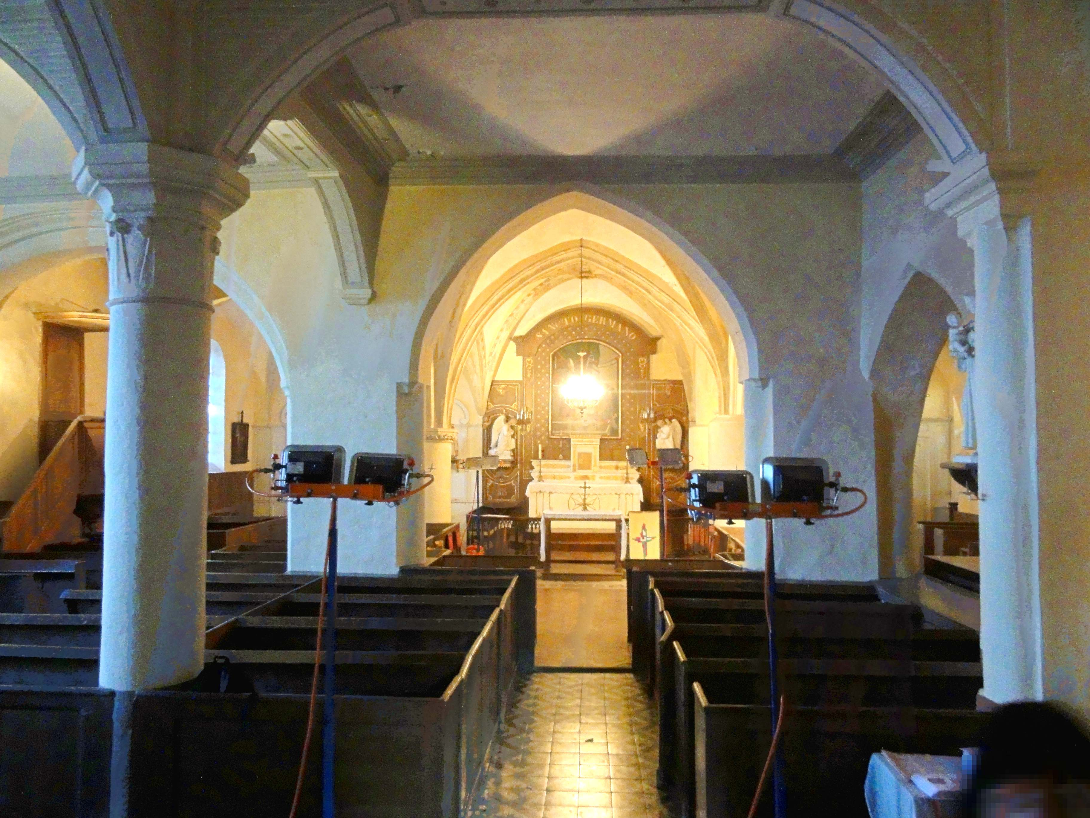 Intérieur de l'église - voir titre.